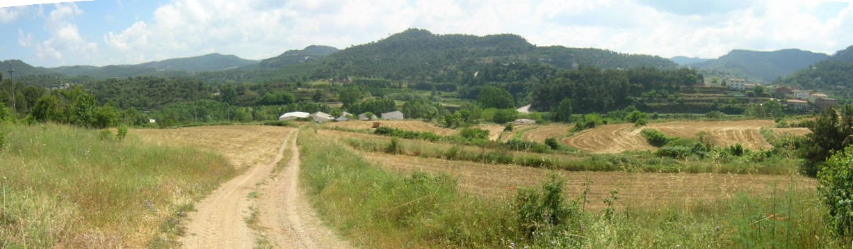 La Llandriga (Monistrol de Calders, Moianès)